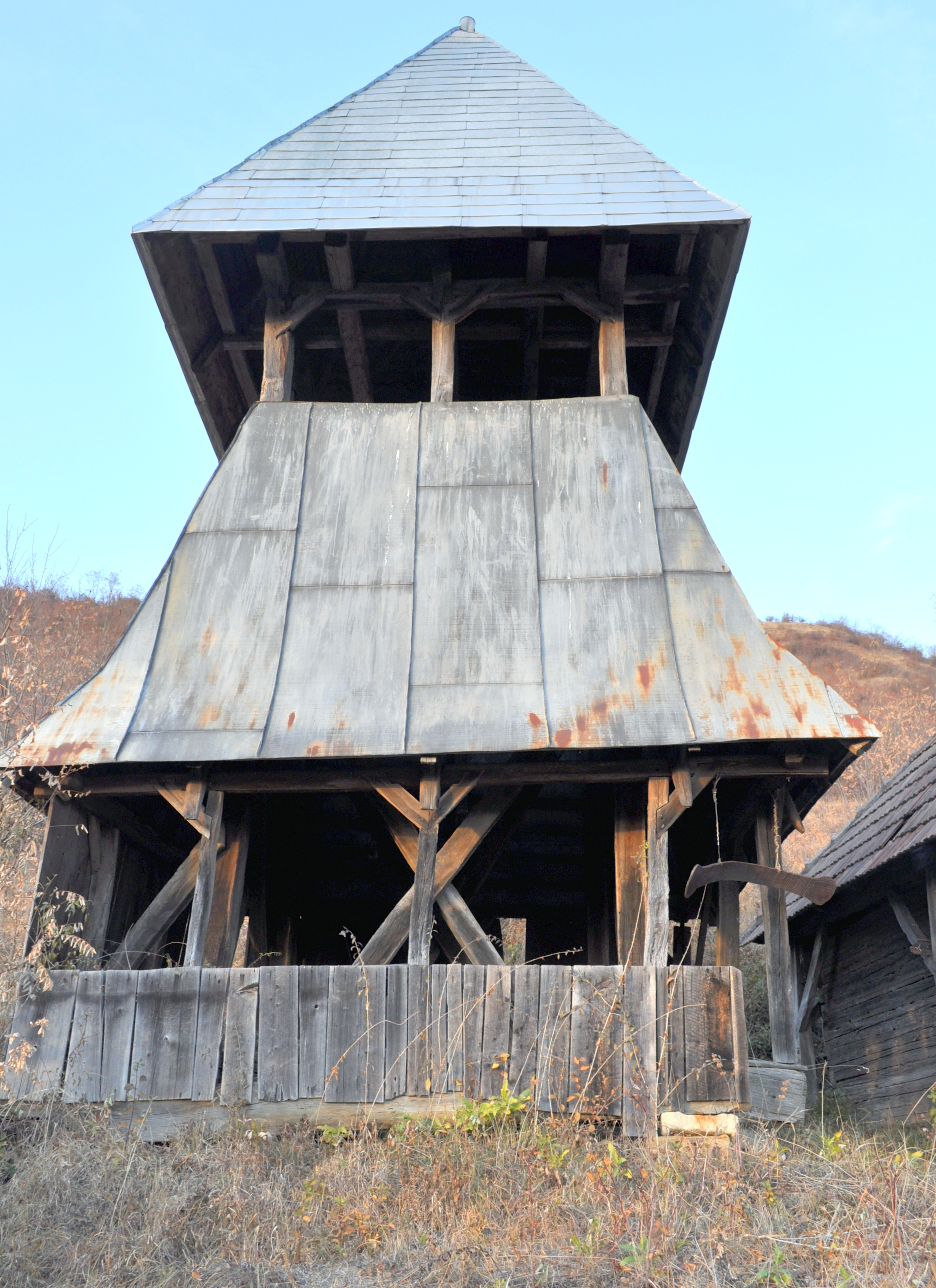 Șilea, județul Alba